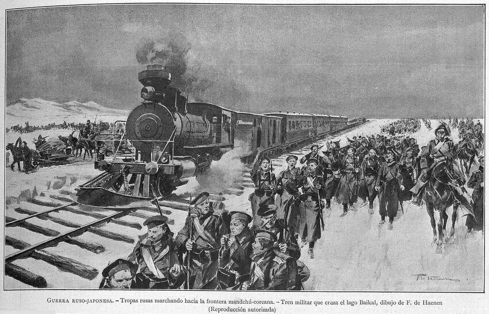 Войска идут к корейско-маньчжурской границе, военный поезд пересекает озеро Байкал (из испанского журнала «Художественная иллюстрация»